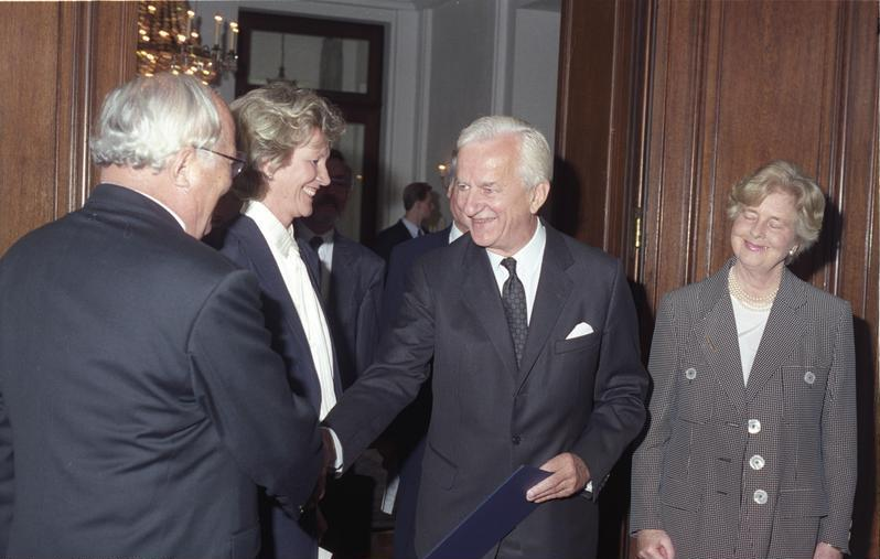 Ordensverleihung: Frau Dr. Helga Henselder Barzel.